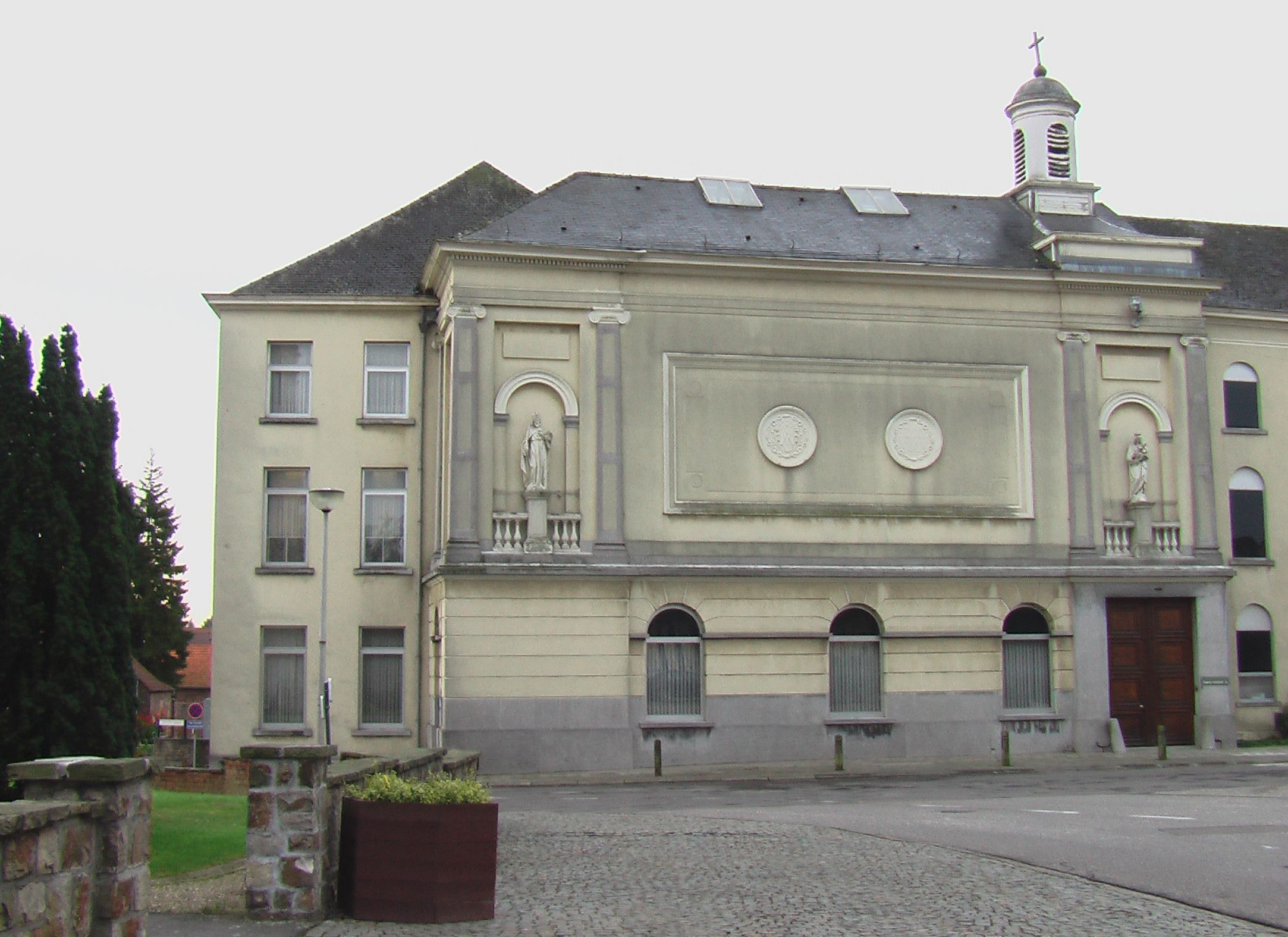 moederklooster van de , nu Zwartzusters-Augustinessen van Halle, gebouwd in 1834, op het Dorpsplein van Erps, , , .